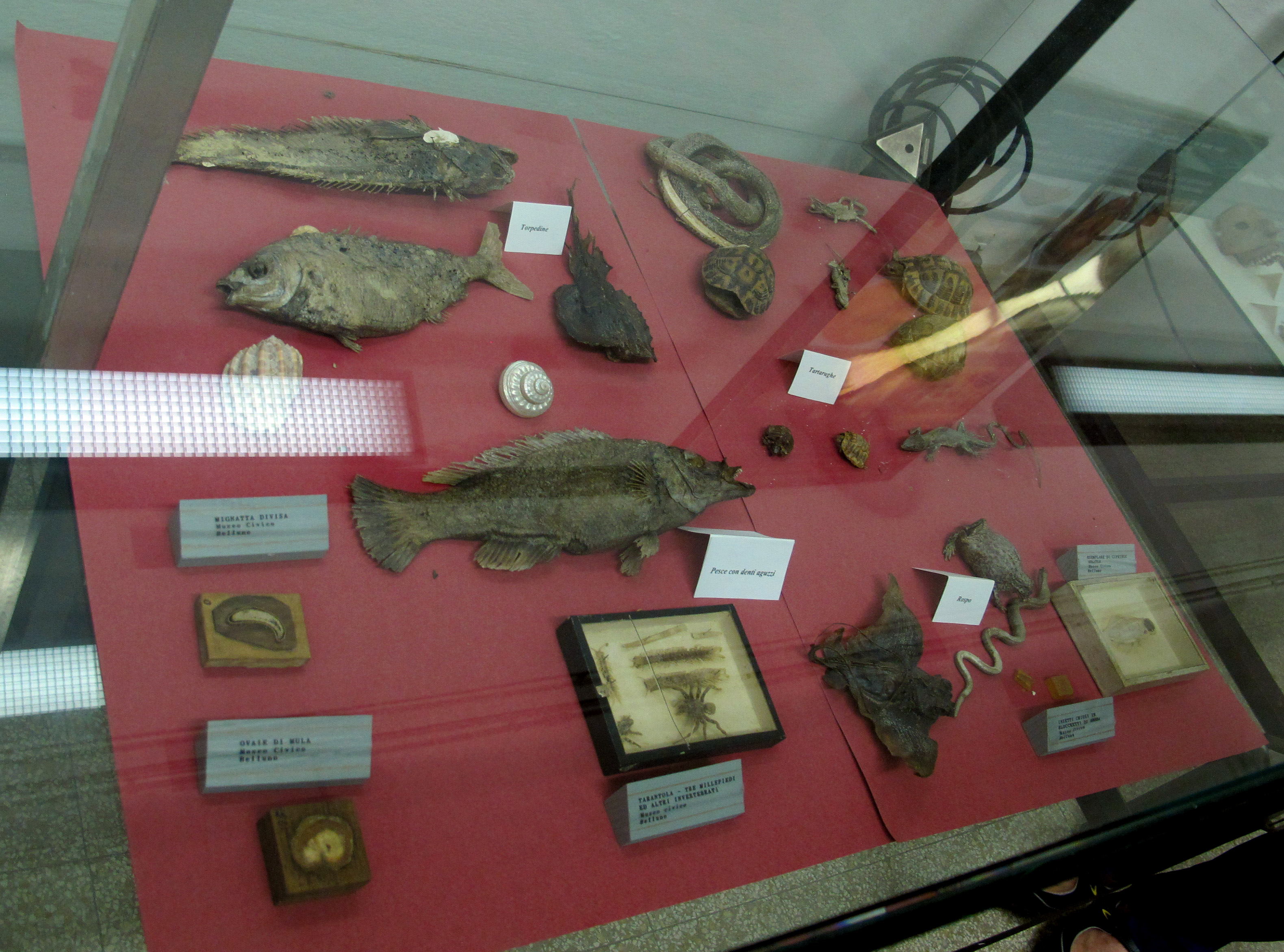 Istituto di anatomia umana normale, museo, campioni di girolamo segato